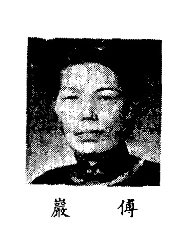 中文（中国大陆）: 制憲國民大會代表